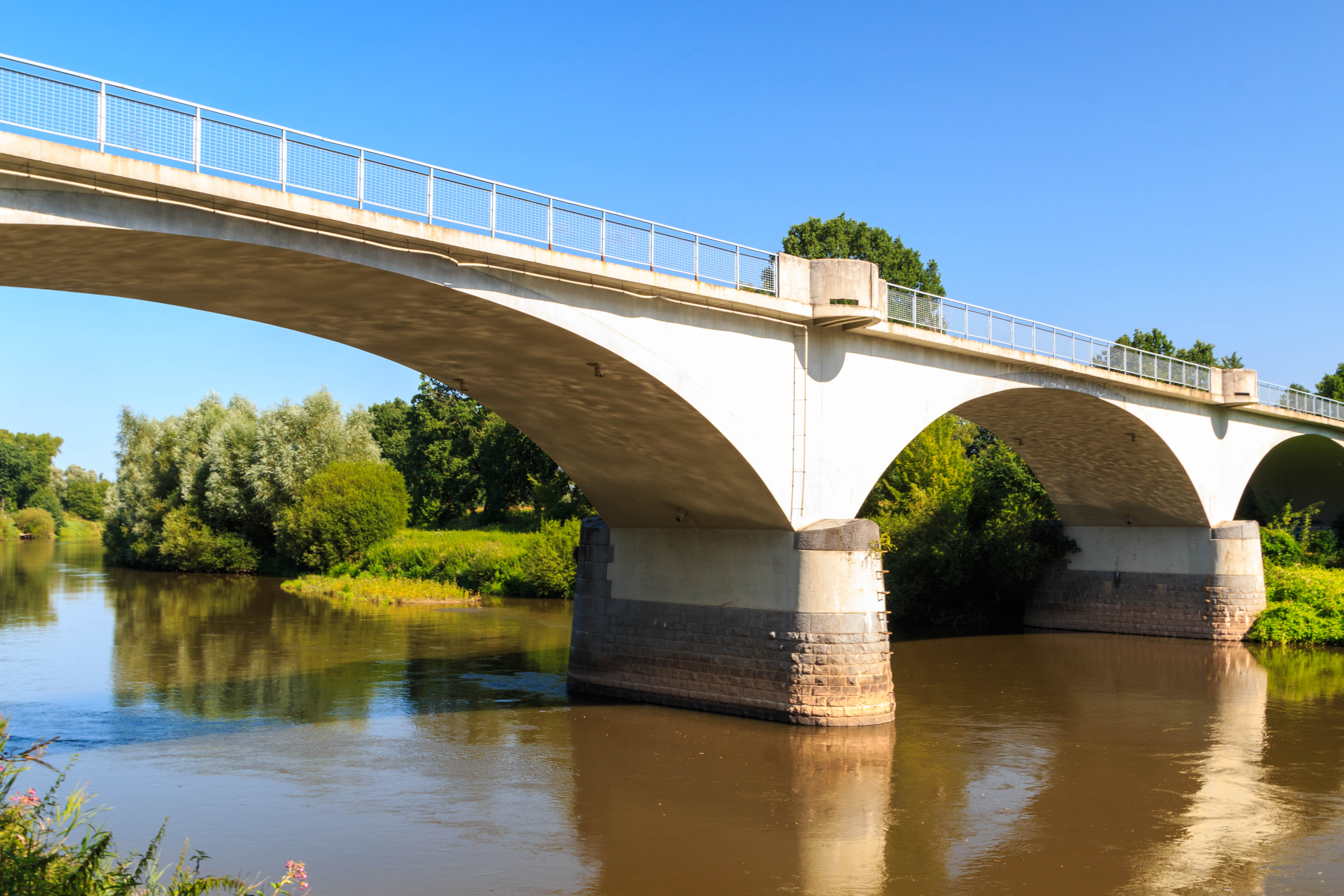 Silniční most, přes Labe, Dříteč.